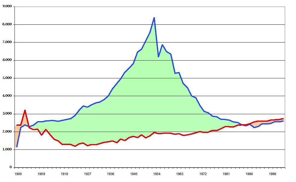 Evolucion mortalidad, natalidad y crecimiento natural de Valladolid